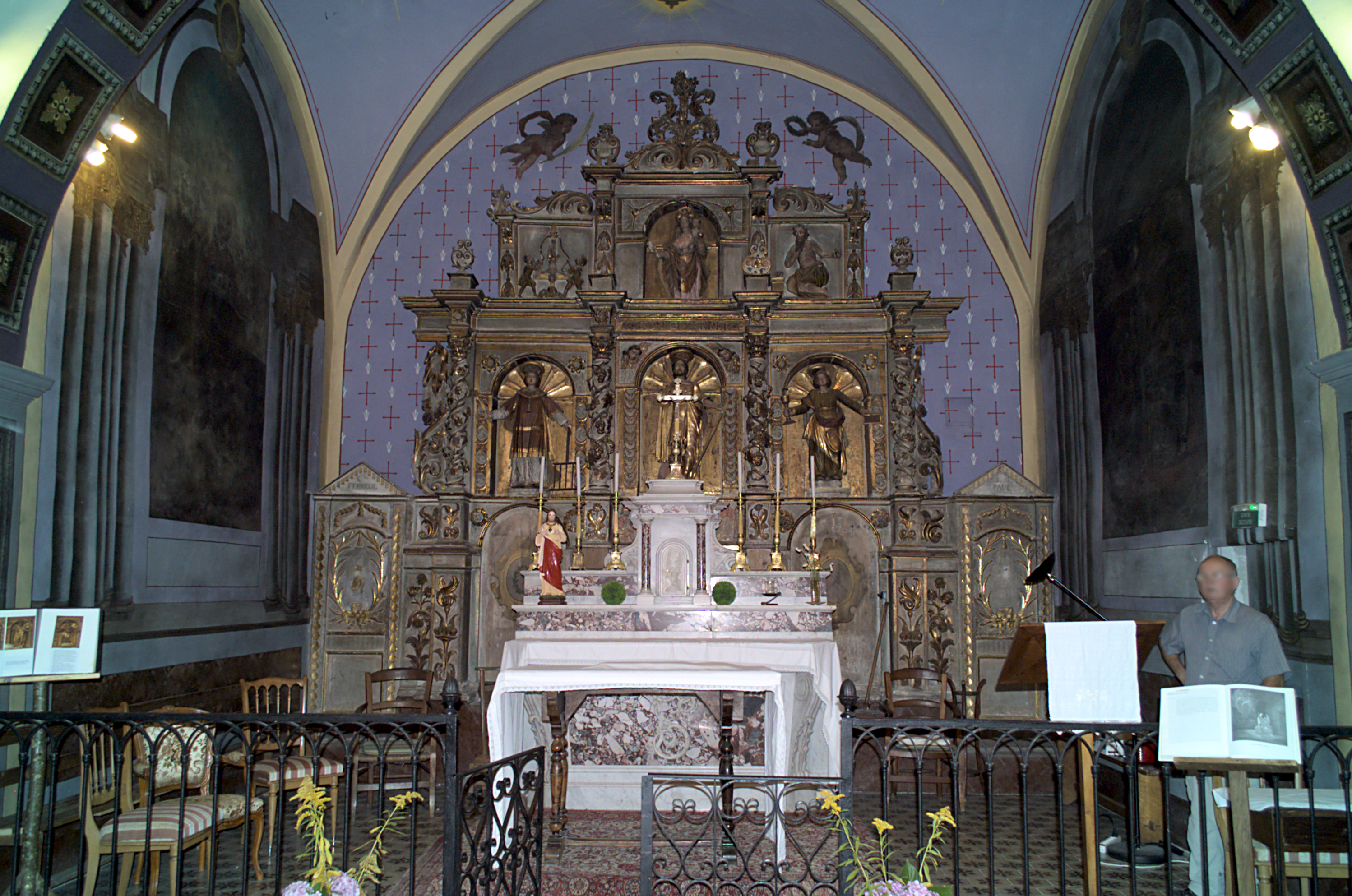 Retable du maitre-autel, ermitage Saint-Ferreol, Céret (Pyrénées-Orientales, Languedoc-Roussillon, France)